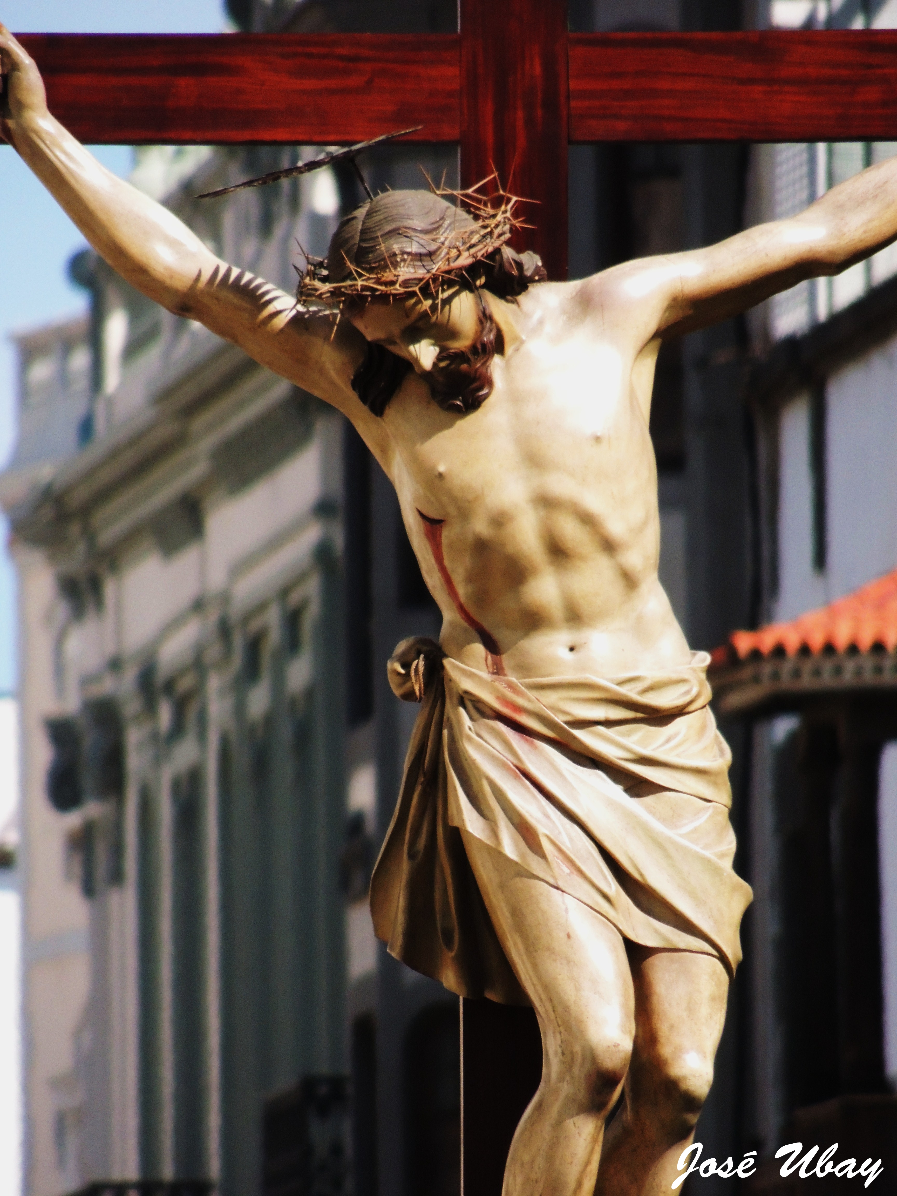 Santísimo Cristo de la Sala Capitular (Las Palmas de Gran Canaria) obra de José Luján Pérez, 1793. Santa Iglesia Catedral Basílica. Ciudad de Las Palmas de Gran Canaria. Gran Canaria.